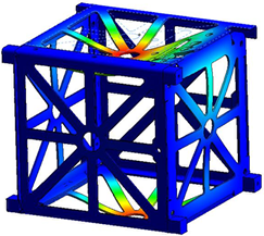 EMEC